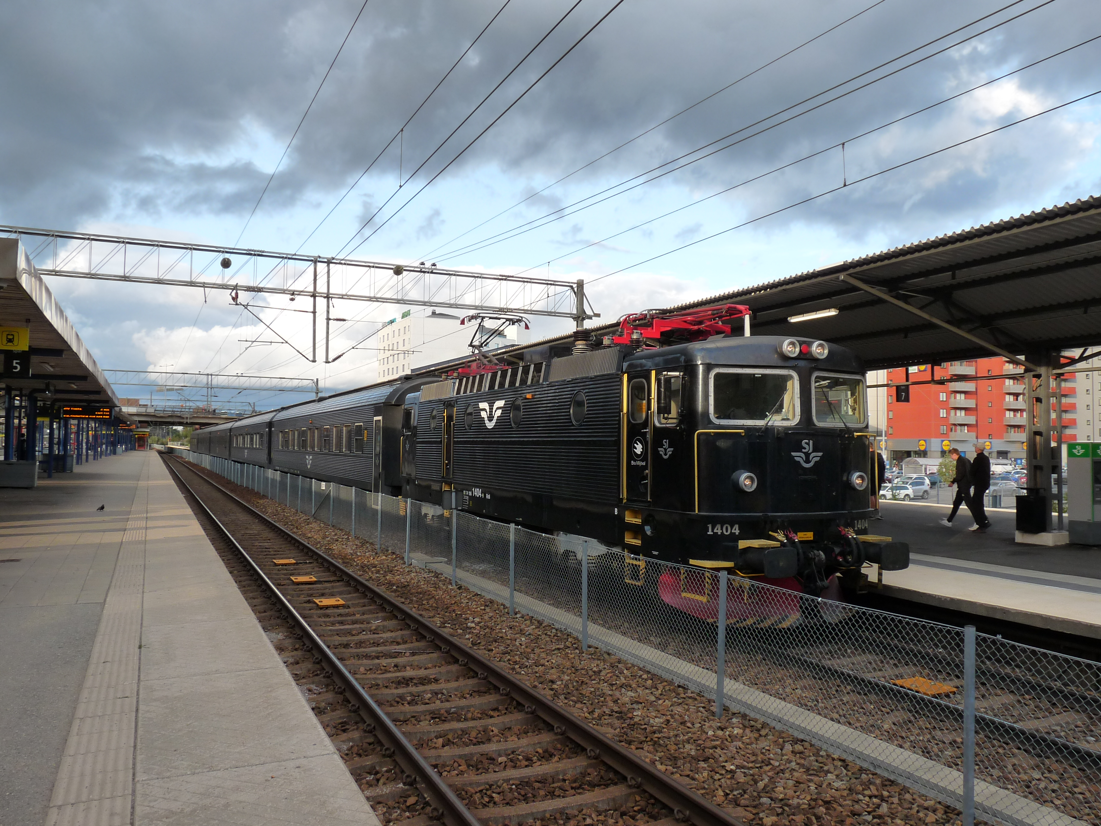 Door werkzaamheden is dit het voorlopig vertrekpunt van de regionale trein in Stockholm.